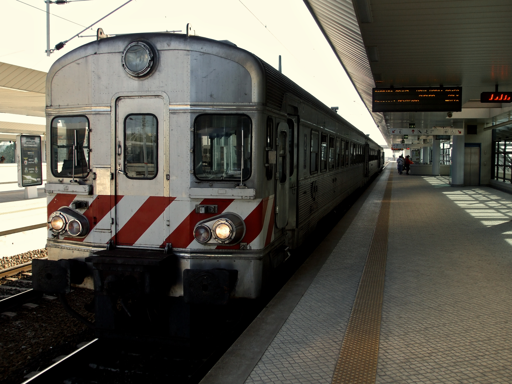 Tipo: Comboio Urbano [Praias do Sado A - Barreiro] Local: Estação de Pinhal Novo [Linha do Sul, PK 37 • Linha do Alentejo, PK 15] Data e hora: 26 de Setembro de 2008 [09h58] Material: Automotora 06xx [Unidade Tripla Diesel]